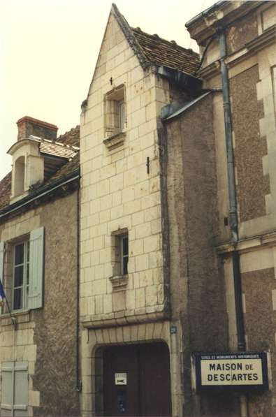 Descartes home